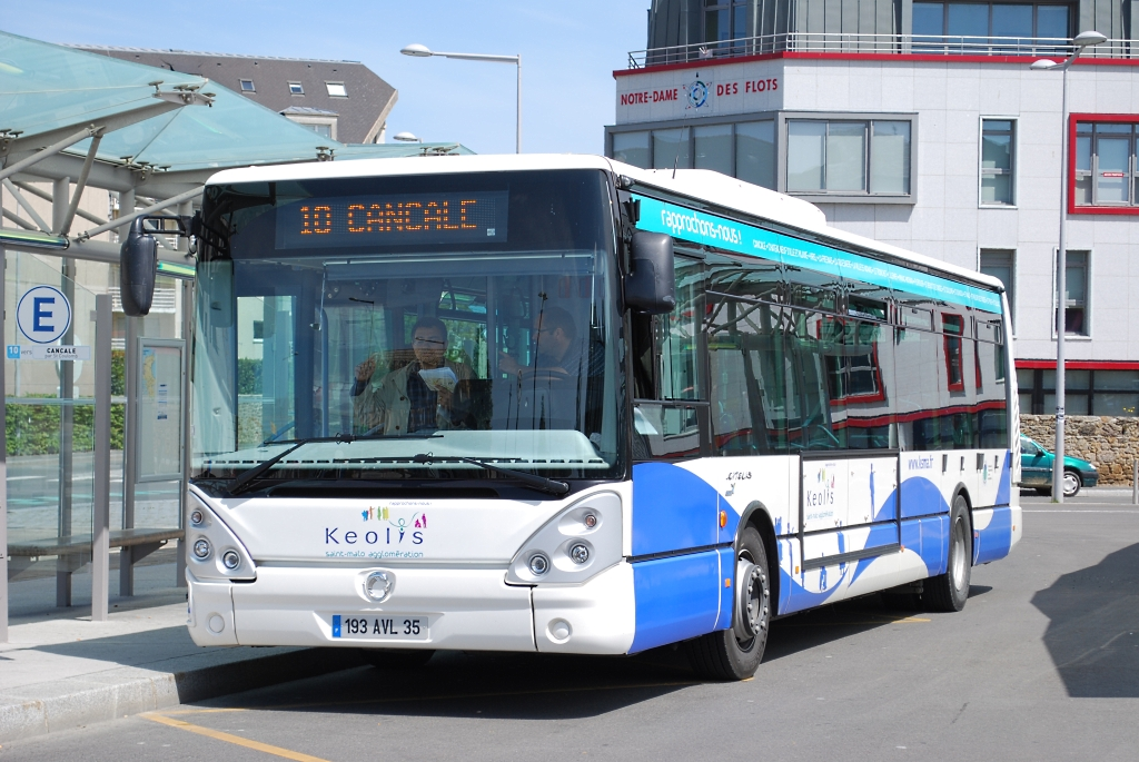 Un Citélis 12 d'Irisbus de Keolis Saint-Malo Agglo. attend son départ de l'arrêt Gares quai E.